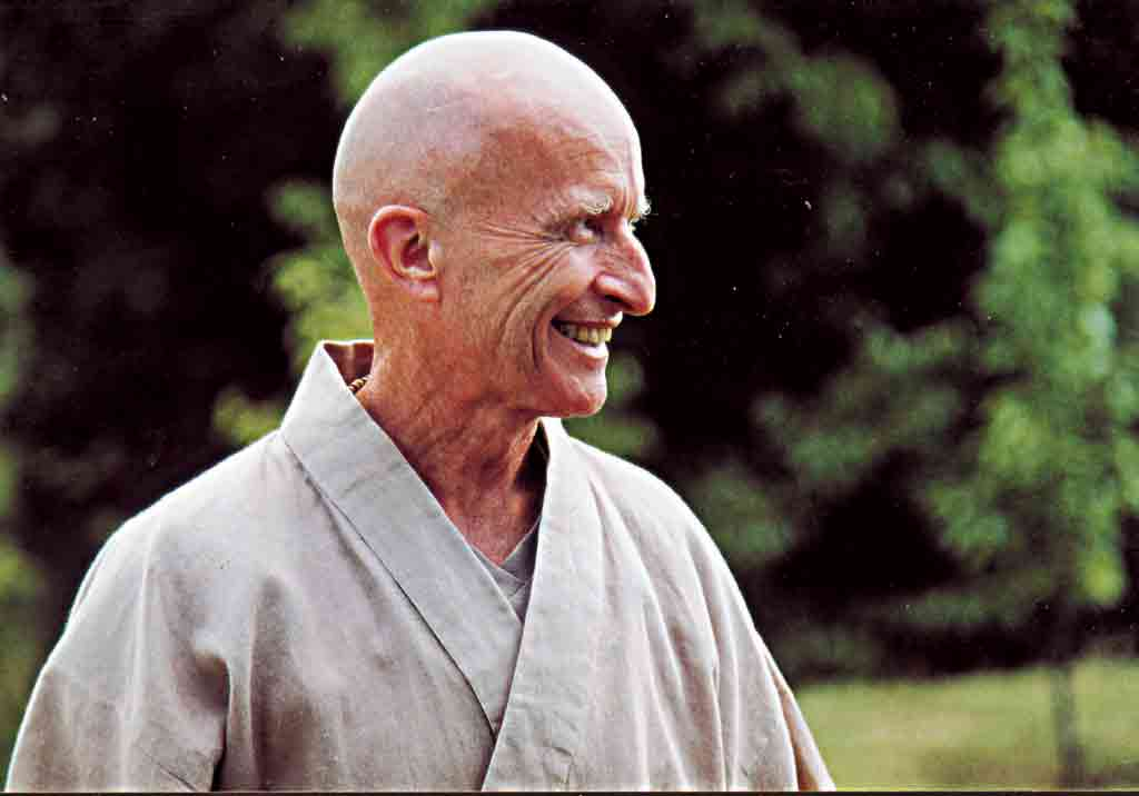 Portrait de Taïkan Jyoji